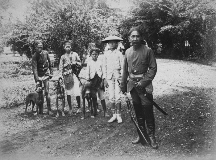 Foto. Groepsportret met de regent van Manondjaja, met jachtgeweer en hazewindhonden